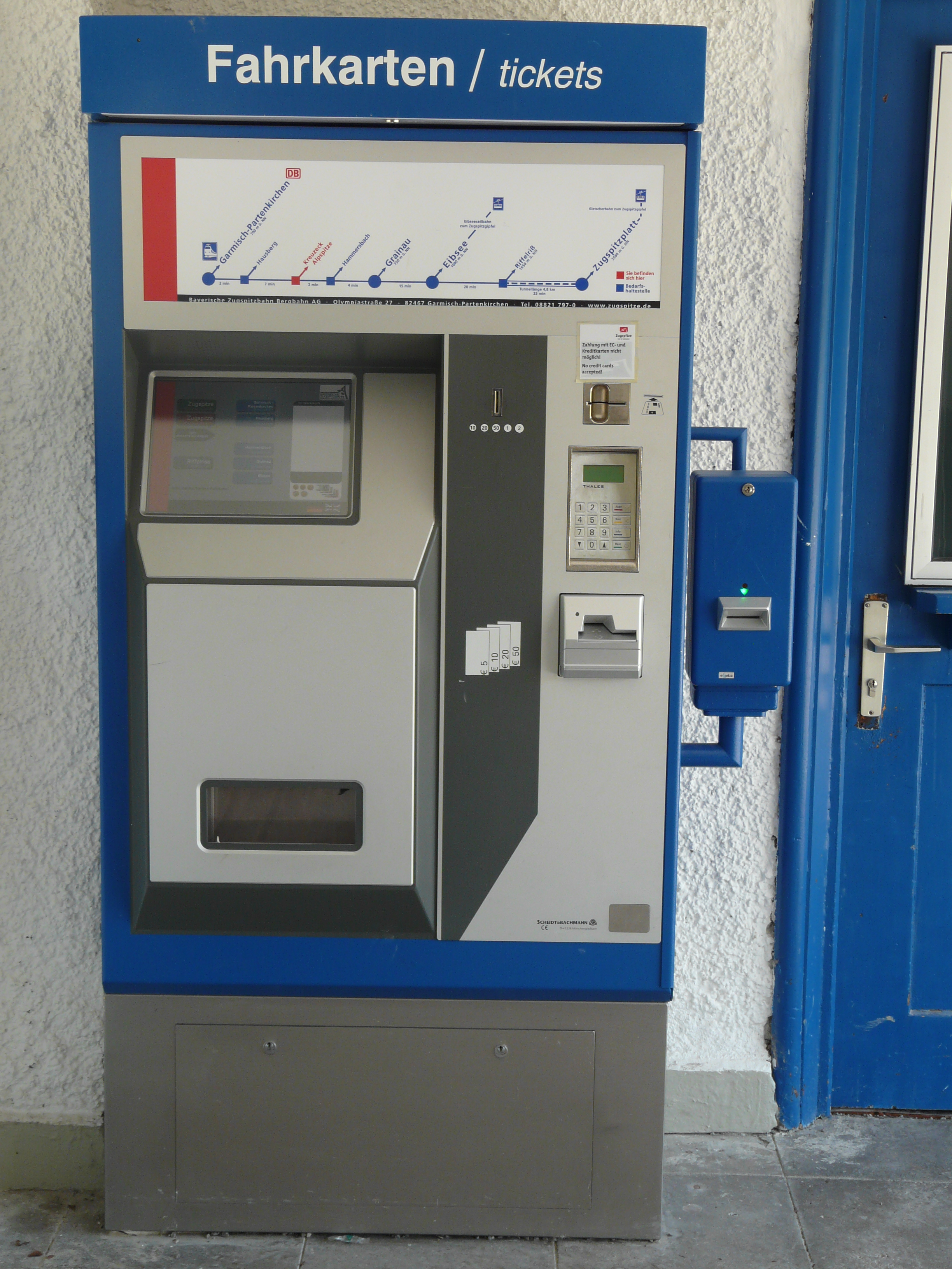 Fahrkartenautomat der Bayerischen Zugspitzbahn am Haltepunkt Kreuzeck-Alpspitze